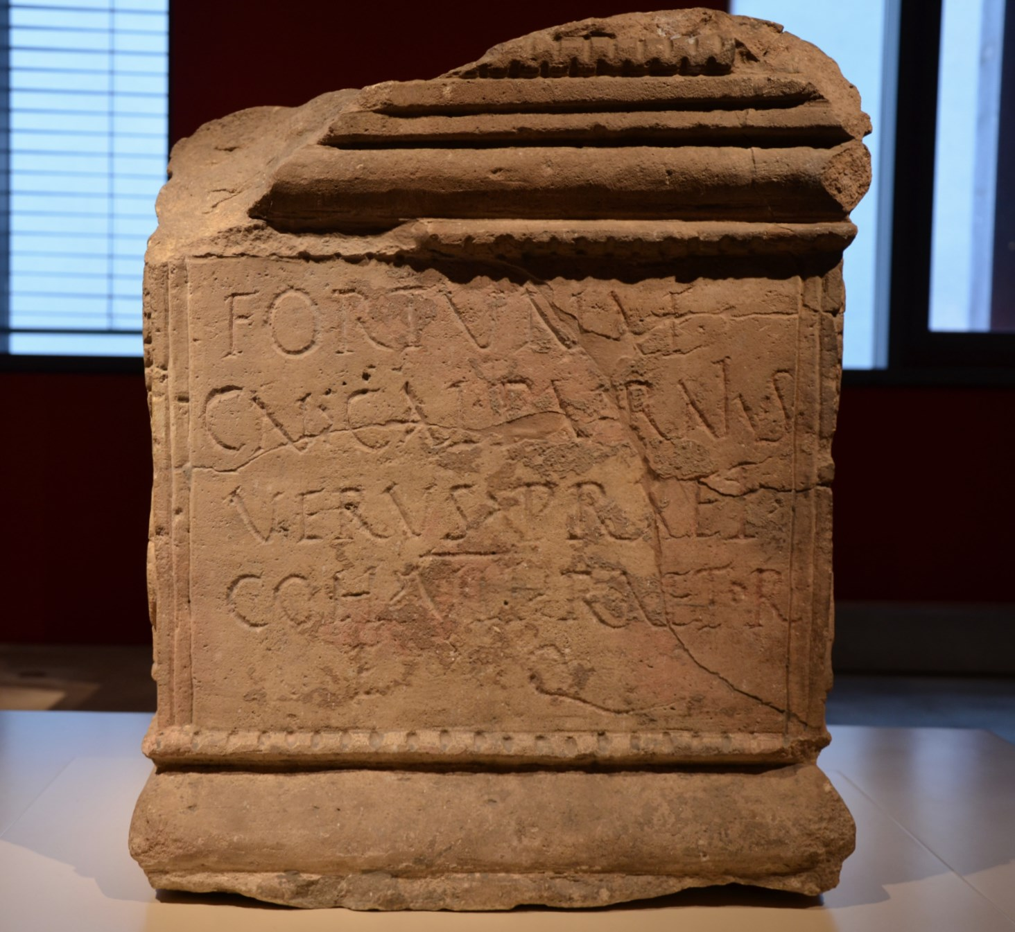 Altar dedicated to Fortuna, LVR-LandesMuseum Bonn